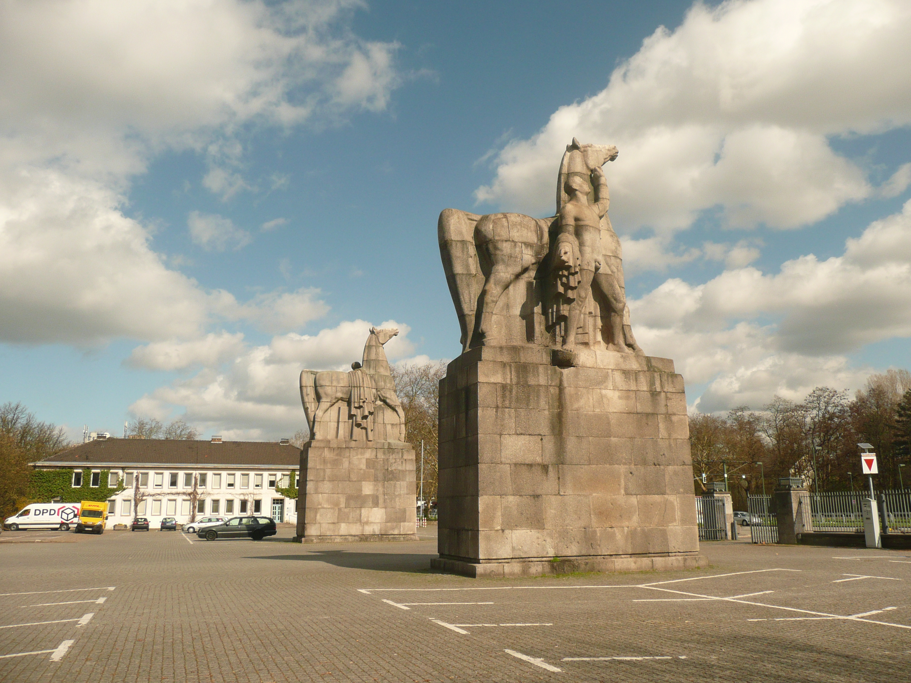 Rossebändiger von Edwin Scharff am Eingang zum Nordpark Düsseldorf